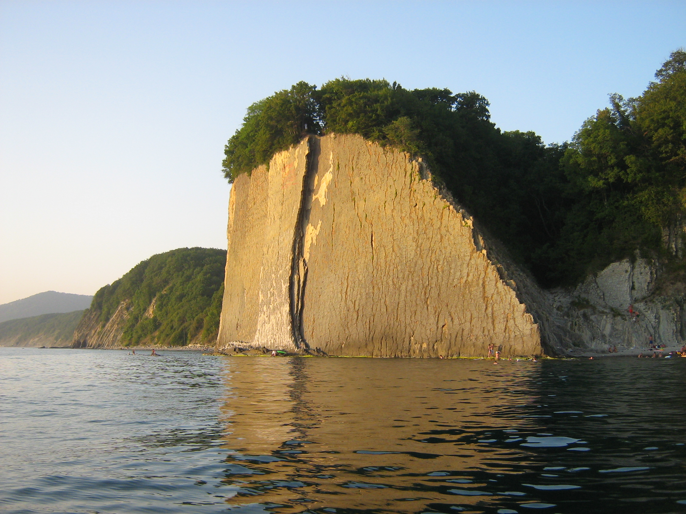 Скала Киселёва, Туапсинский район, Краснодарский край